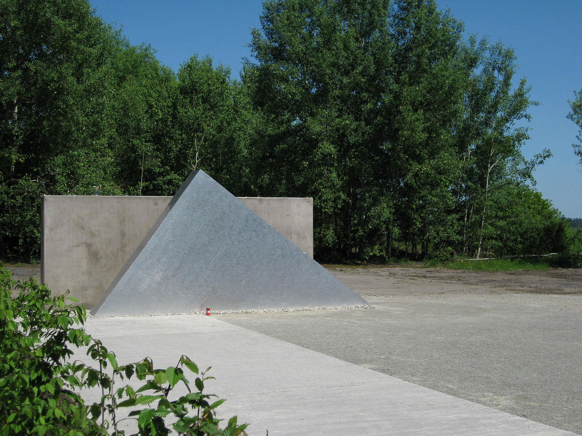 Mahnmal für die Gedenkstätte des KZ-Außenlager Hailfingen/Tailfingen, Gestaltung: Rudolf Kurz, 2010, Deutschland, Baden-Württemberg, auf der Kreisgrenze der Landkreise Tübingen und Böblingen